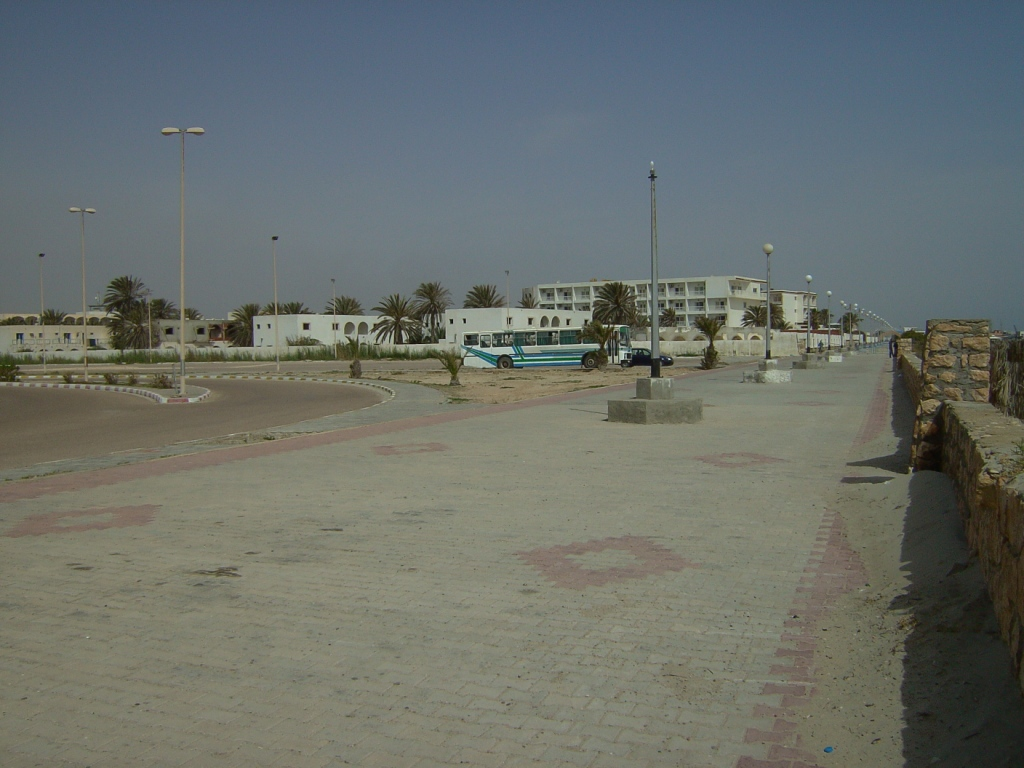 Gabès promanade.